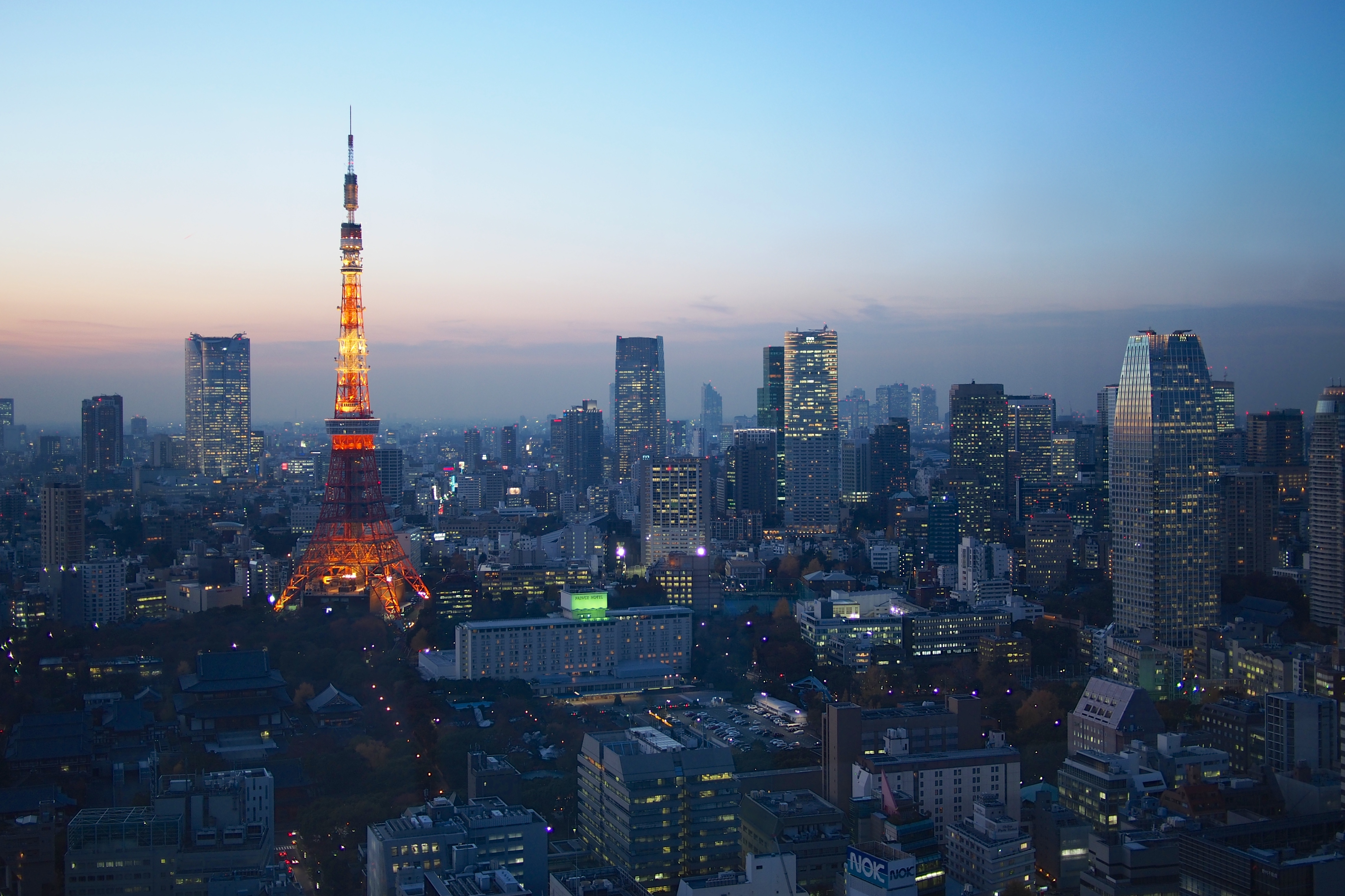 Tokyo, Japan